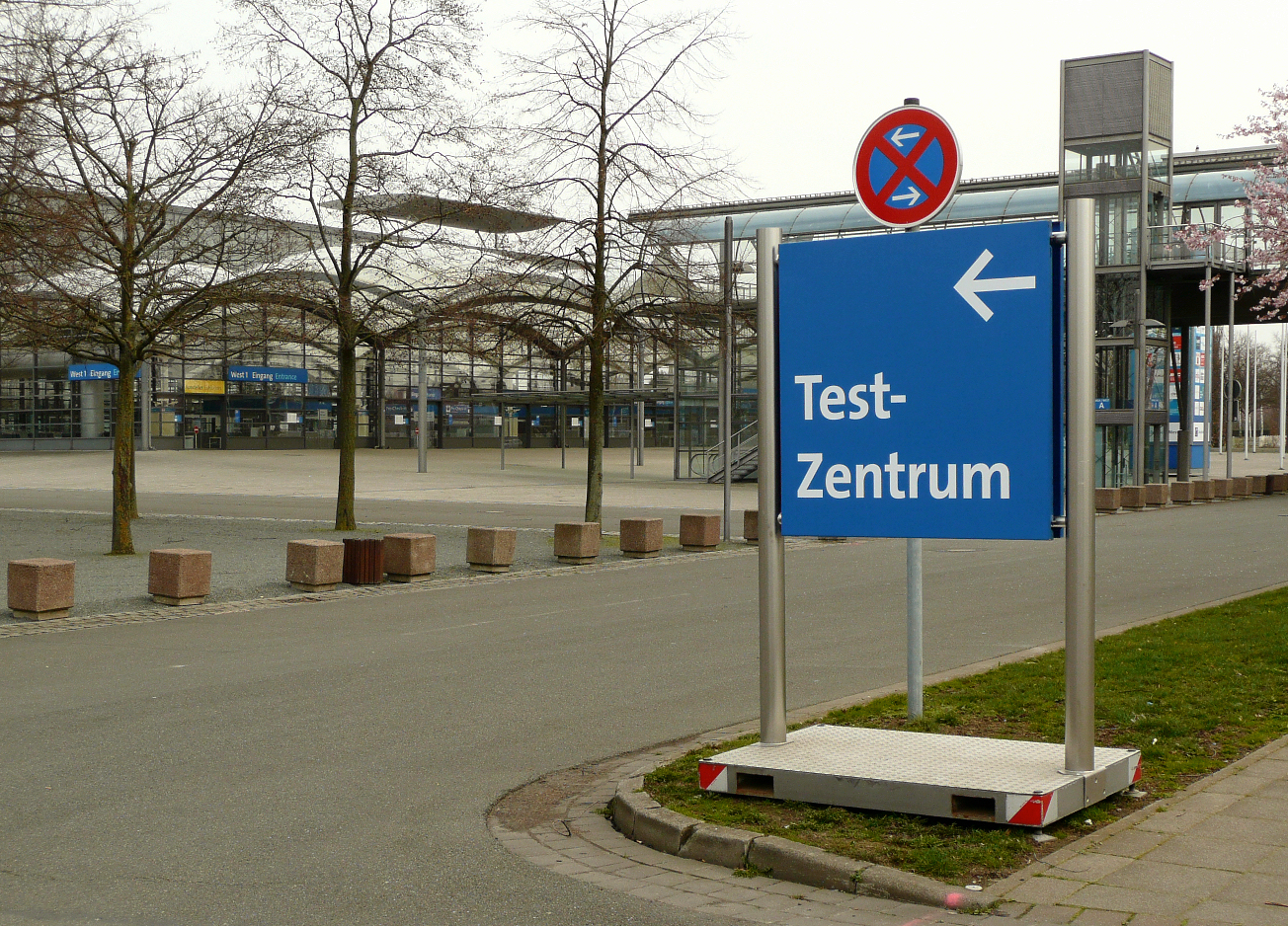 Drive in Testcenter auf COVID-19 in Hannover auf dem Messegelände